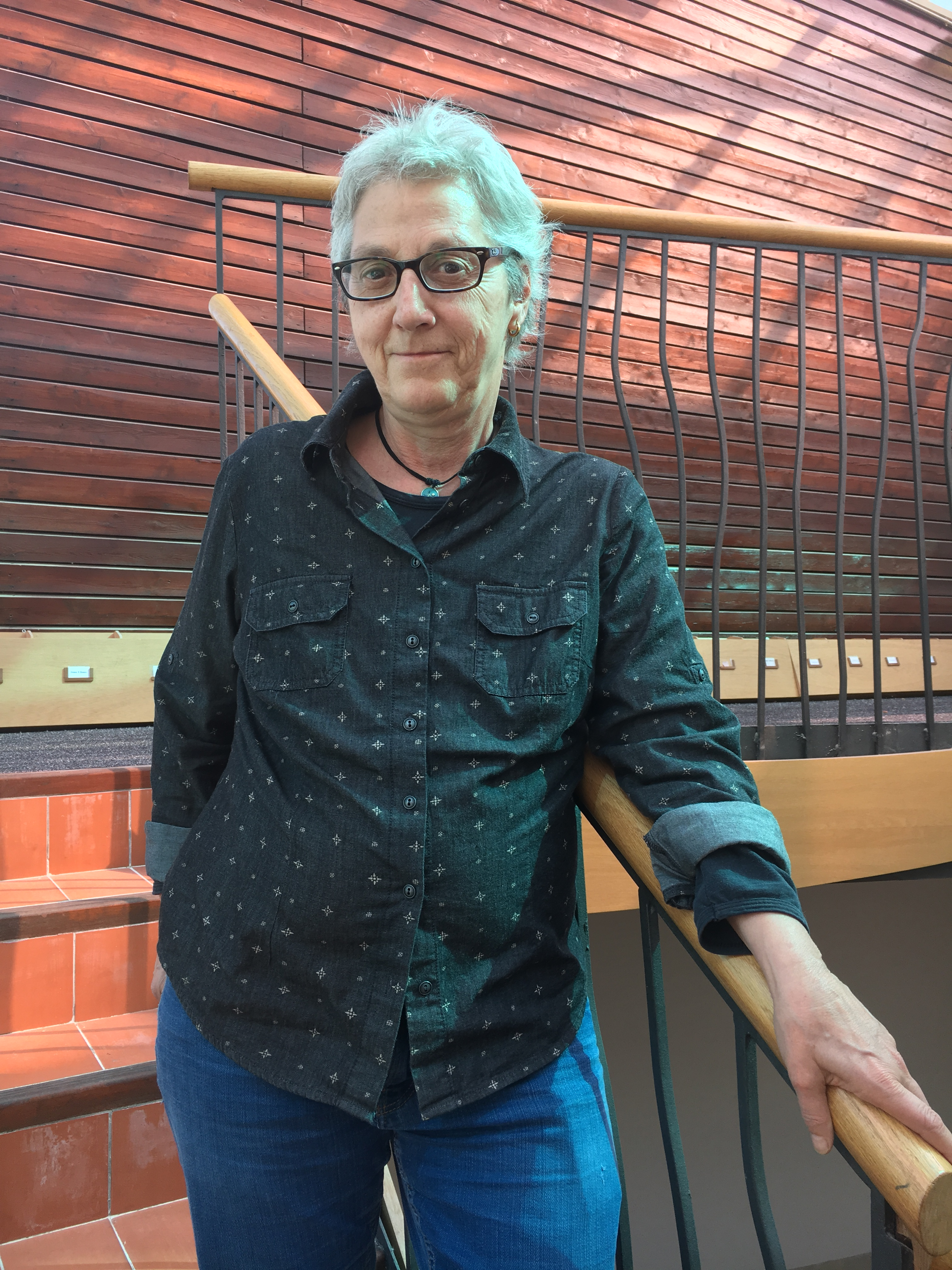 A l’escala de Ca la dona